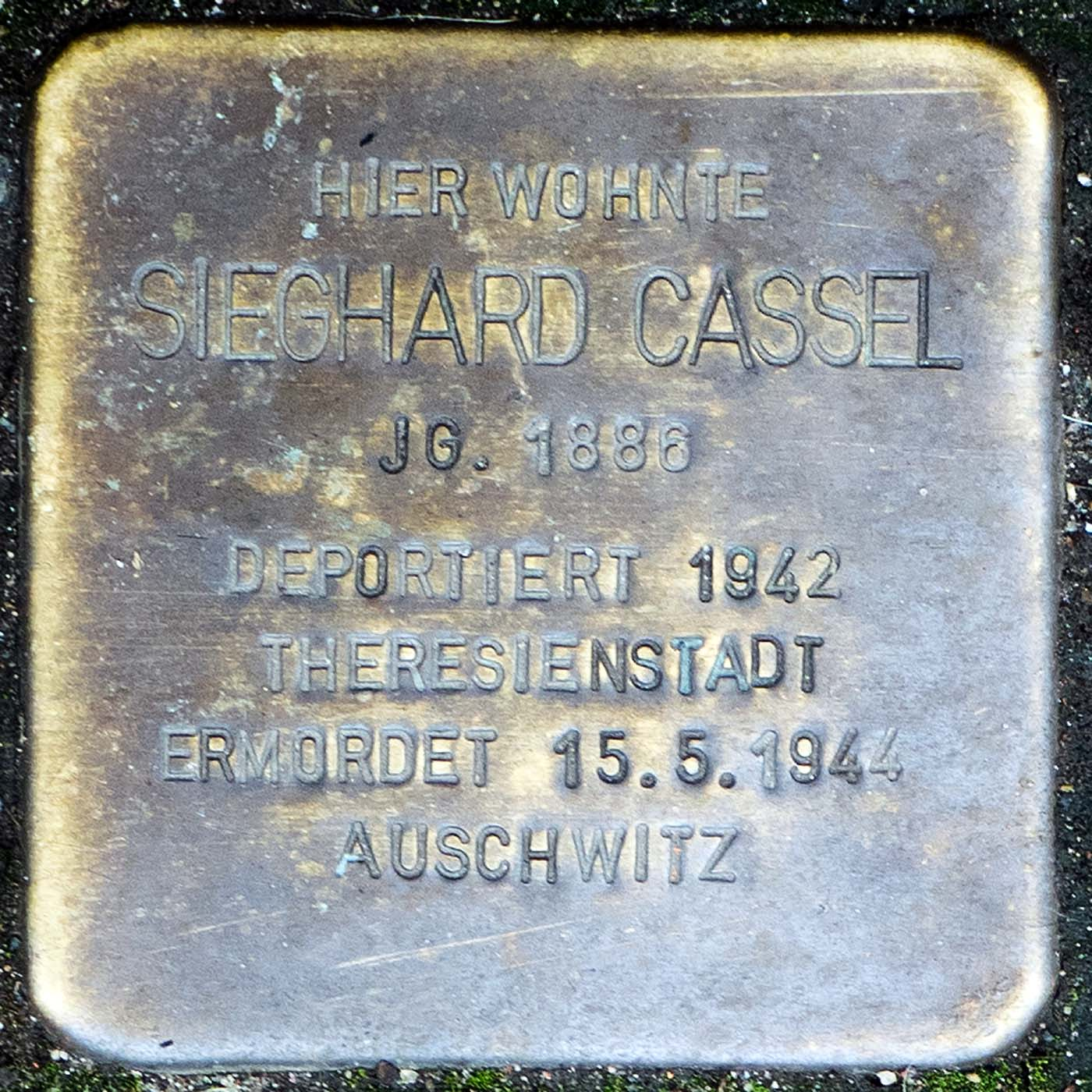 Stolperstein für Sieghard Cassel (Willich)